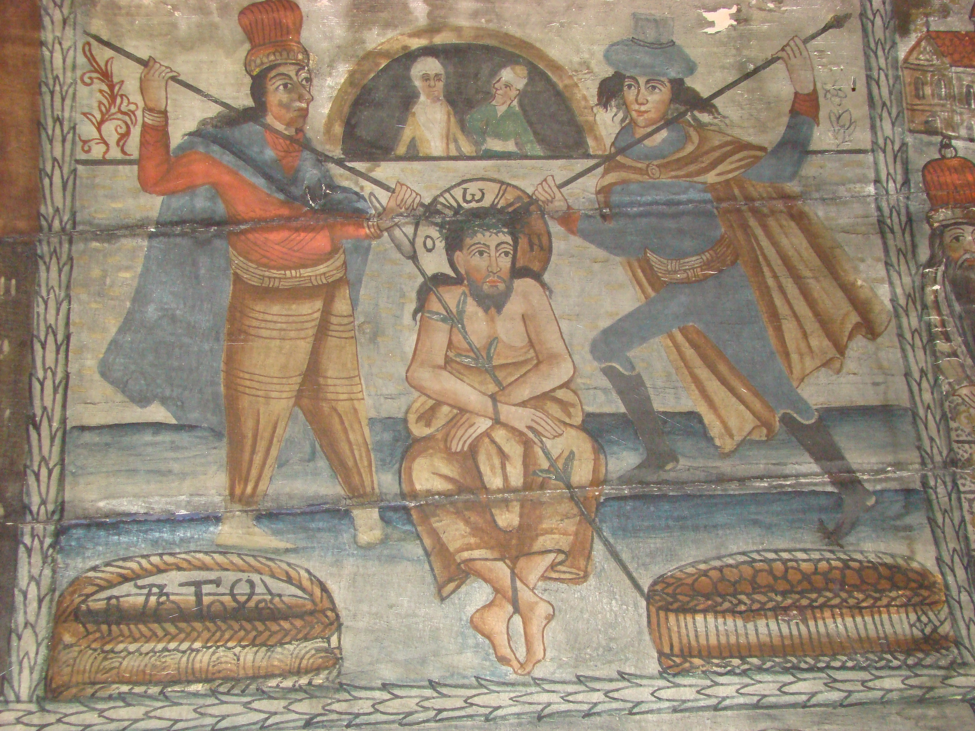 Biserica de lemn din Ticu-colonie, județul Cluj